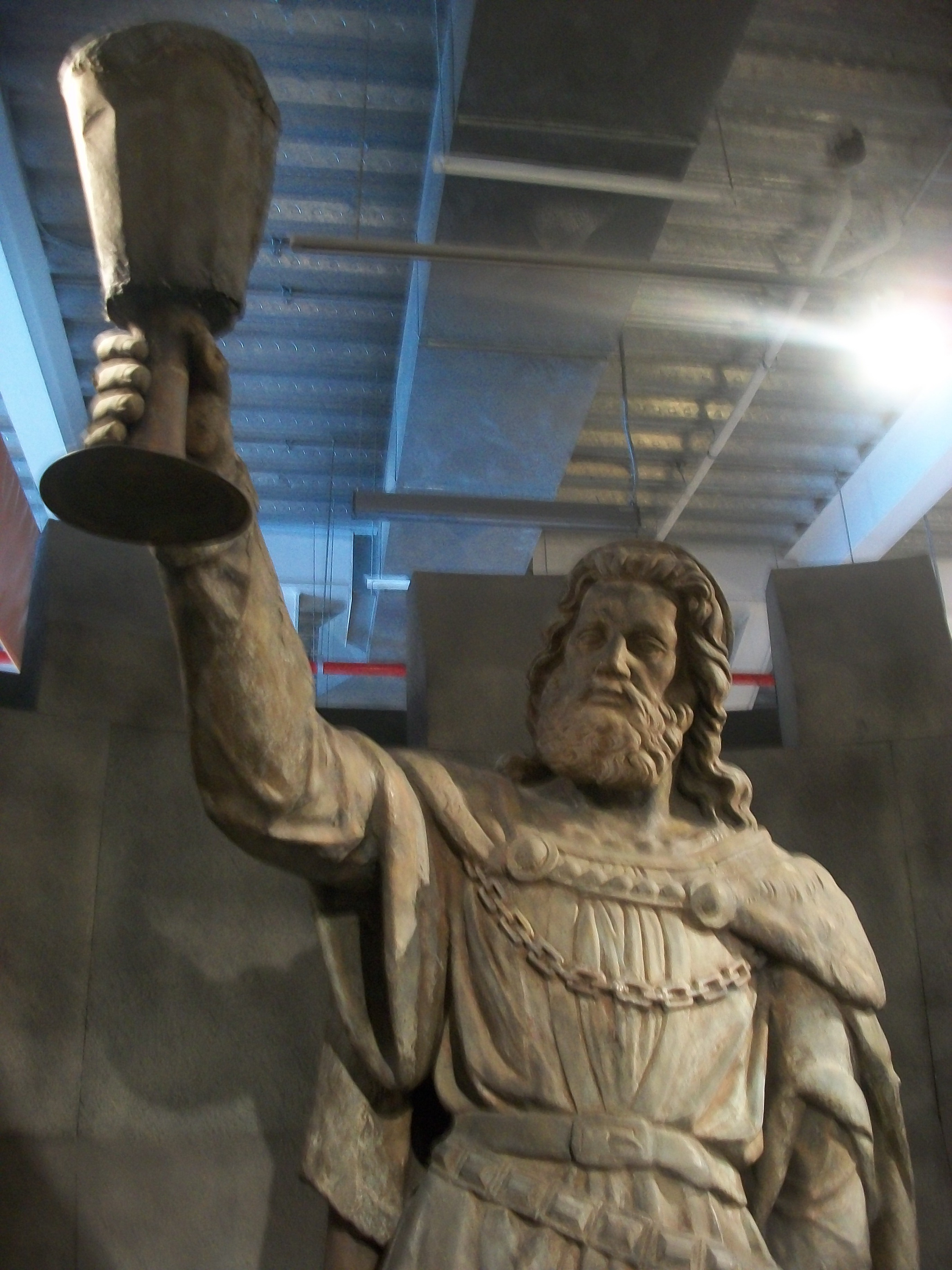 Estatua del rey Gambrinus en la sala "Bebida milenaria" en el Museo Modelo de Ciencias e Industria, Toluca, Estado de México, México.